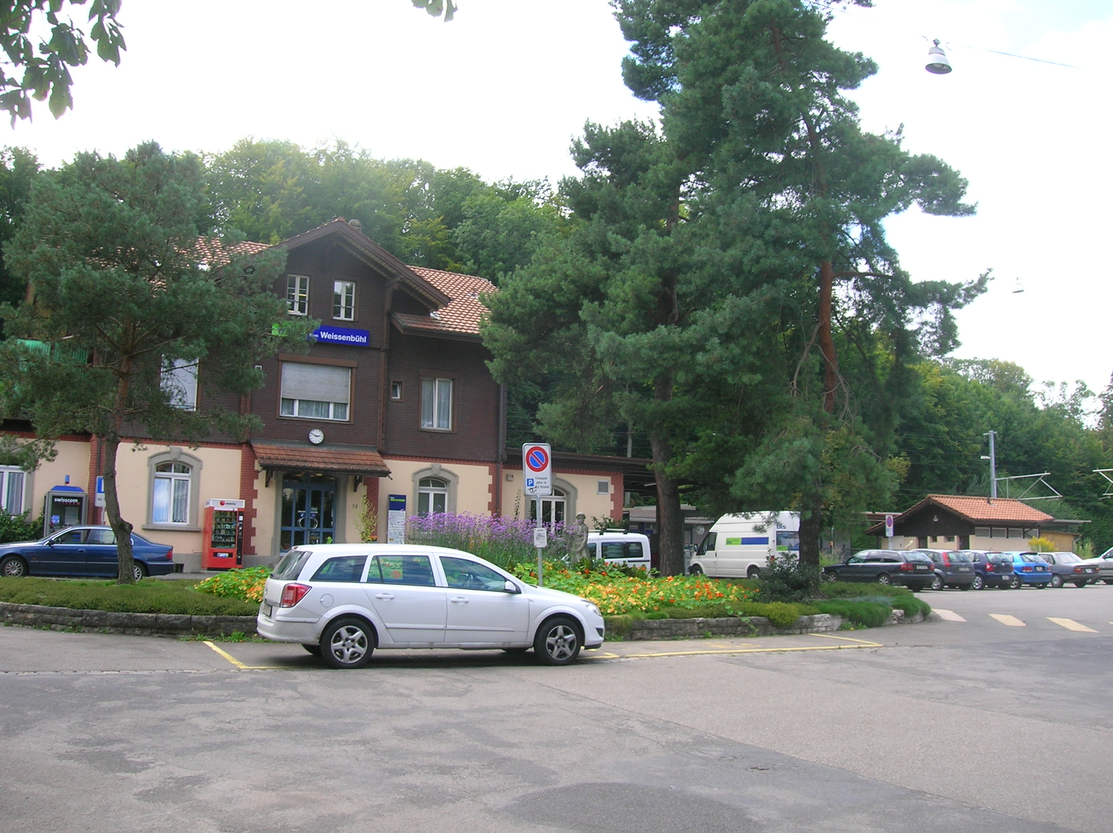 Bahnhof Weissenbühl